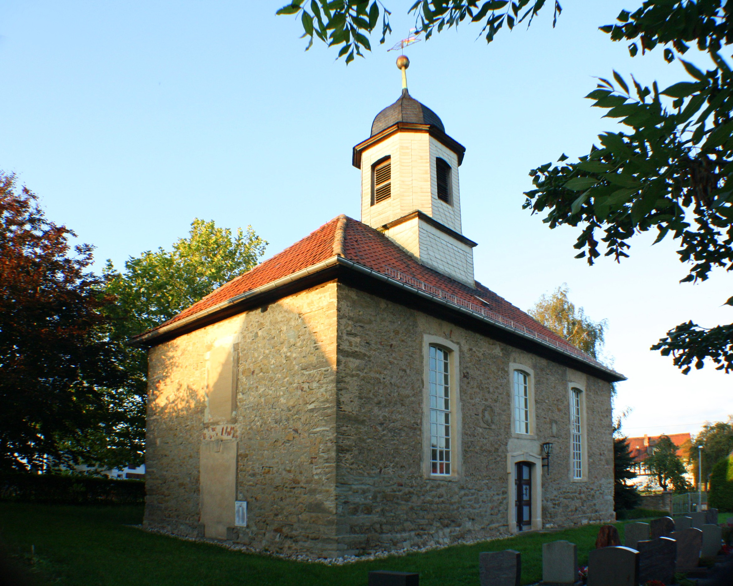 Kirche in Bethenhausen bei Gera/Ostthüringen